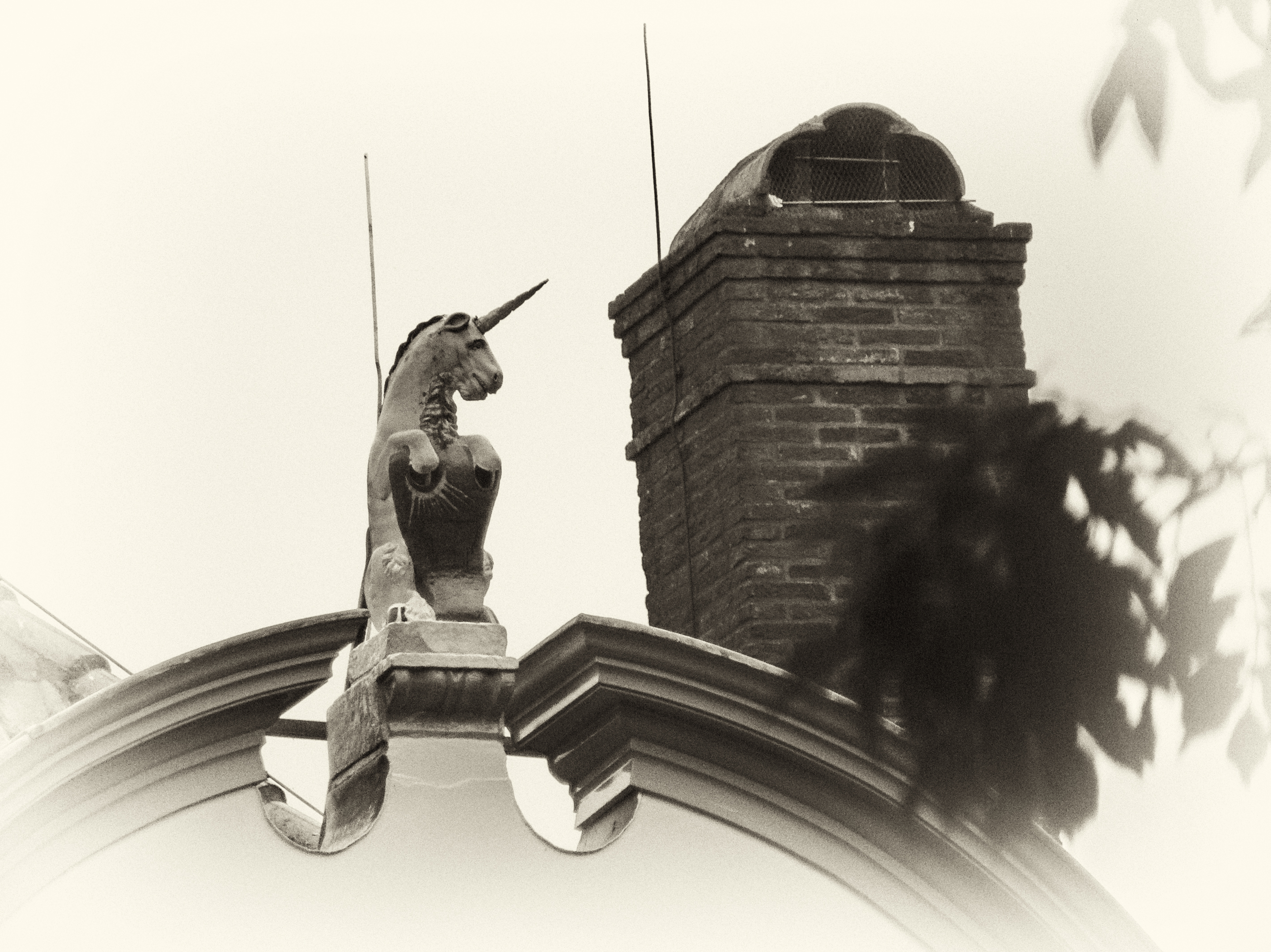 Detail stelphoeve. De middenpartij van de voorgevel is een variant van de Amsterdamse Vingboonsstijl, bekroond met o.a. het beeld van een eenhoorn en versierd met gebeeldhouwde gevelornamenten en een cartouche met 1682.